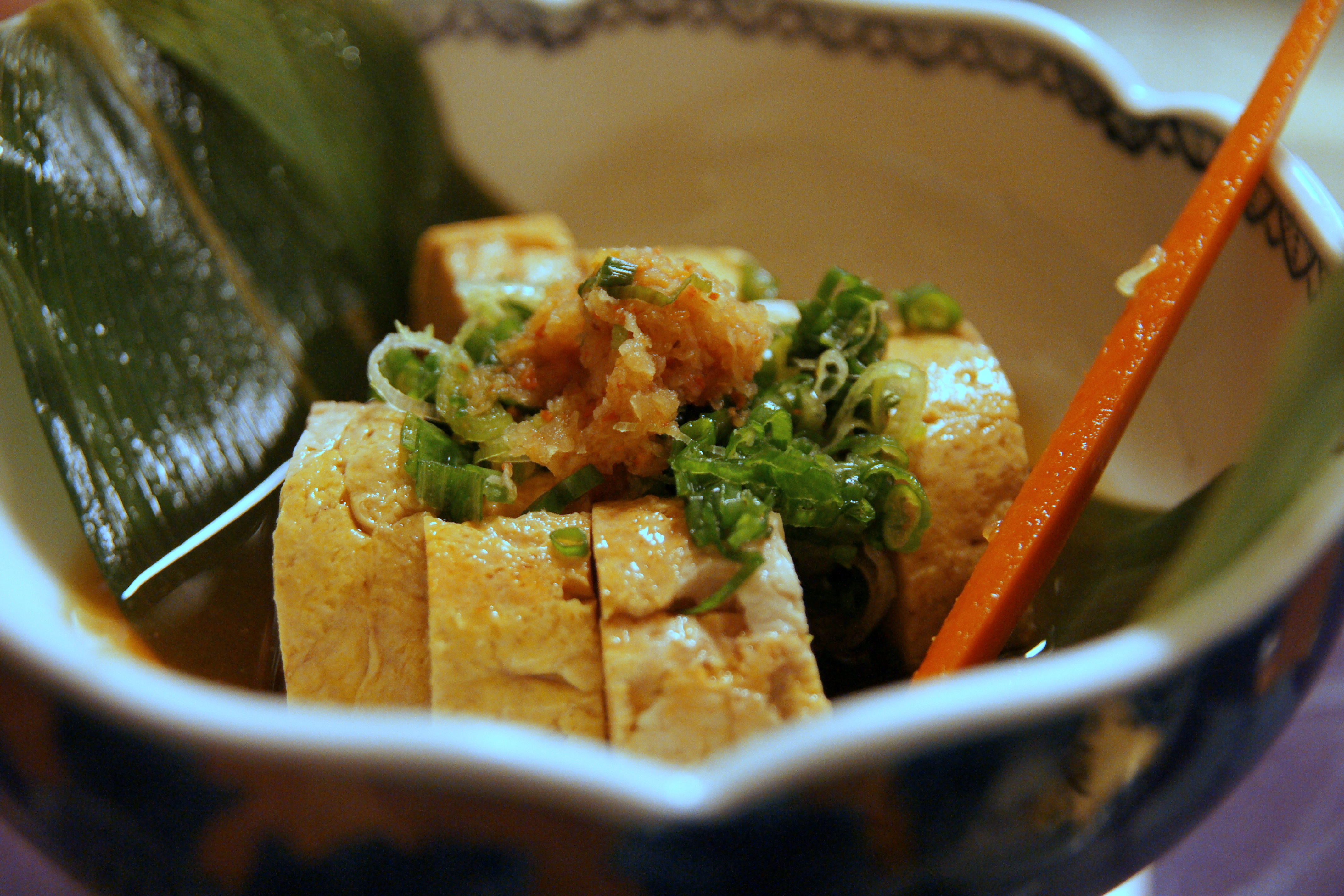 Ankimo, aka monk fish liver. Sushi Go 55, Los Angeles, CA